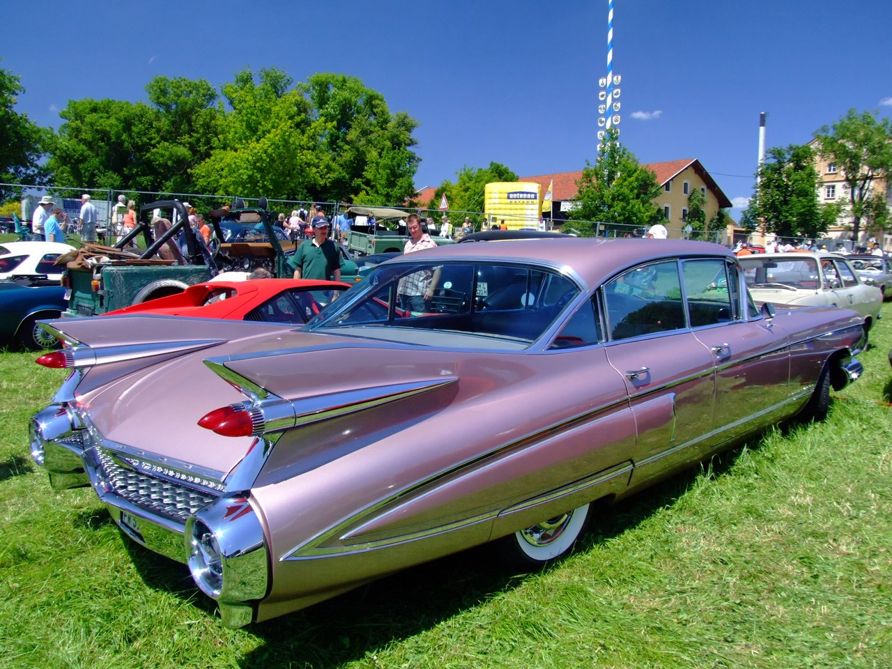 Quelle: selbst fotografiert, 06/2007 Fotograf: Späth Chr.